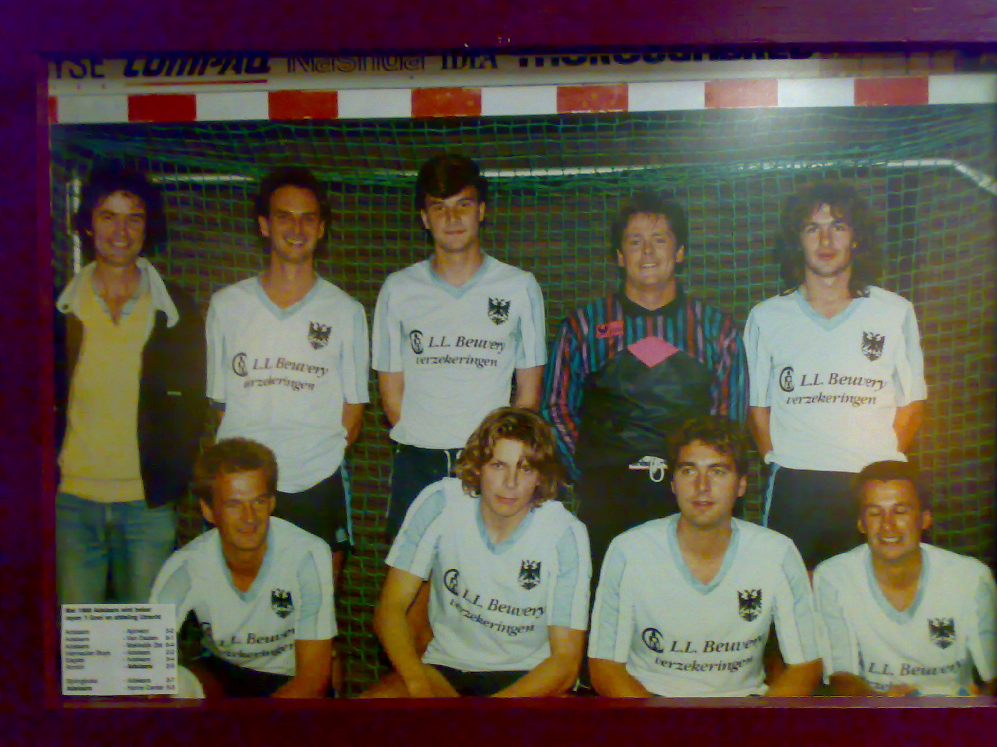 ZVV Adelaars in 1990 met tweede van linksonder Youri Mulder